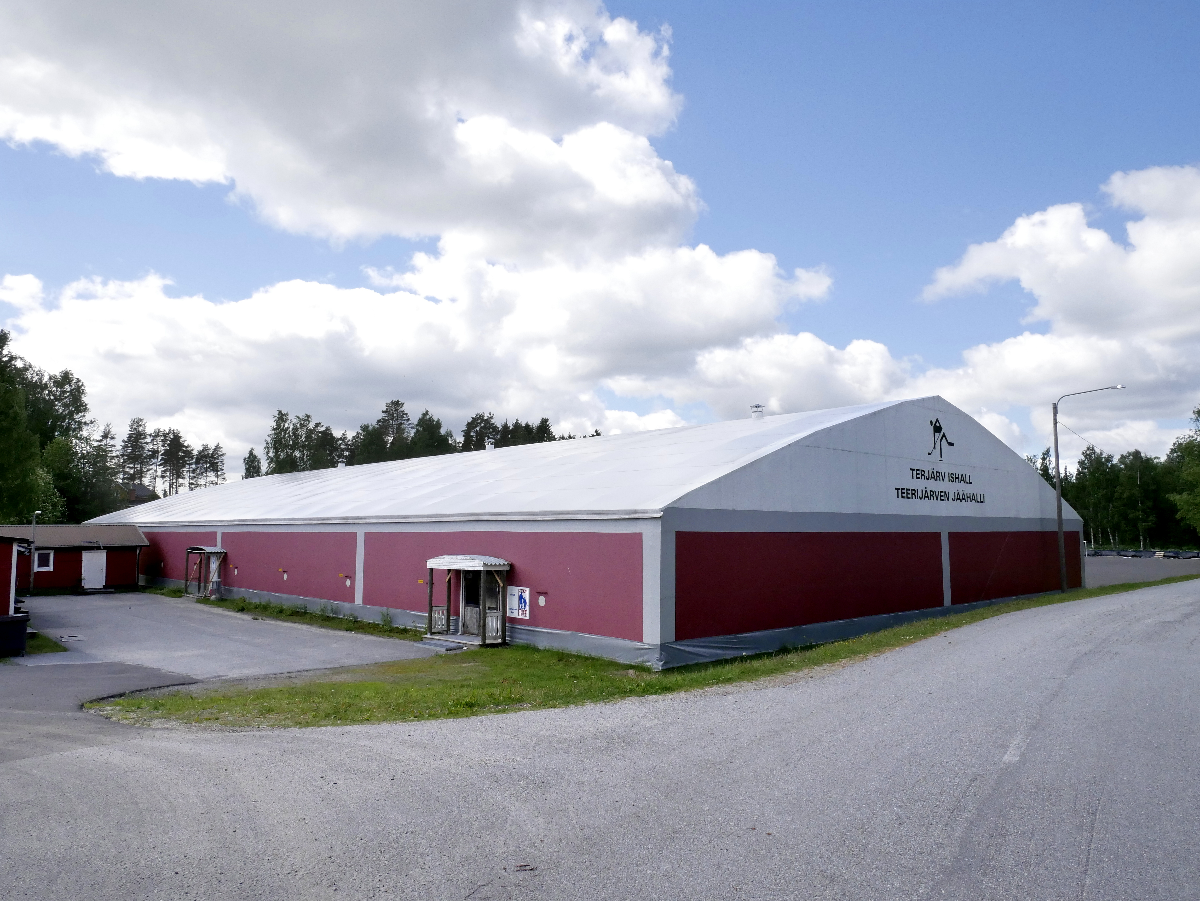 Teerijärven jäähalli.